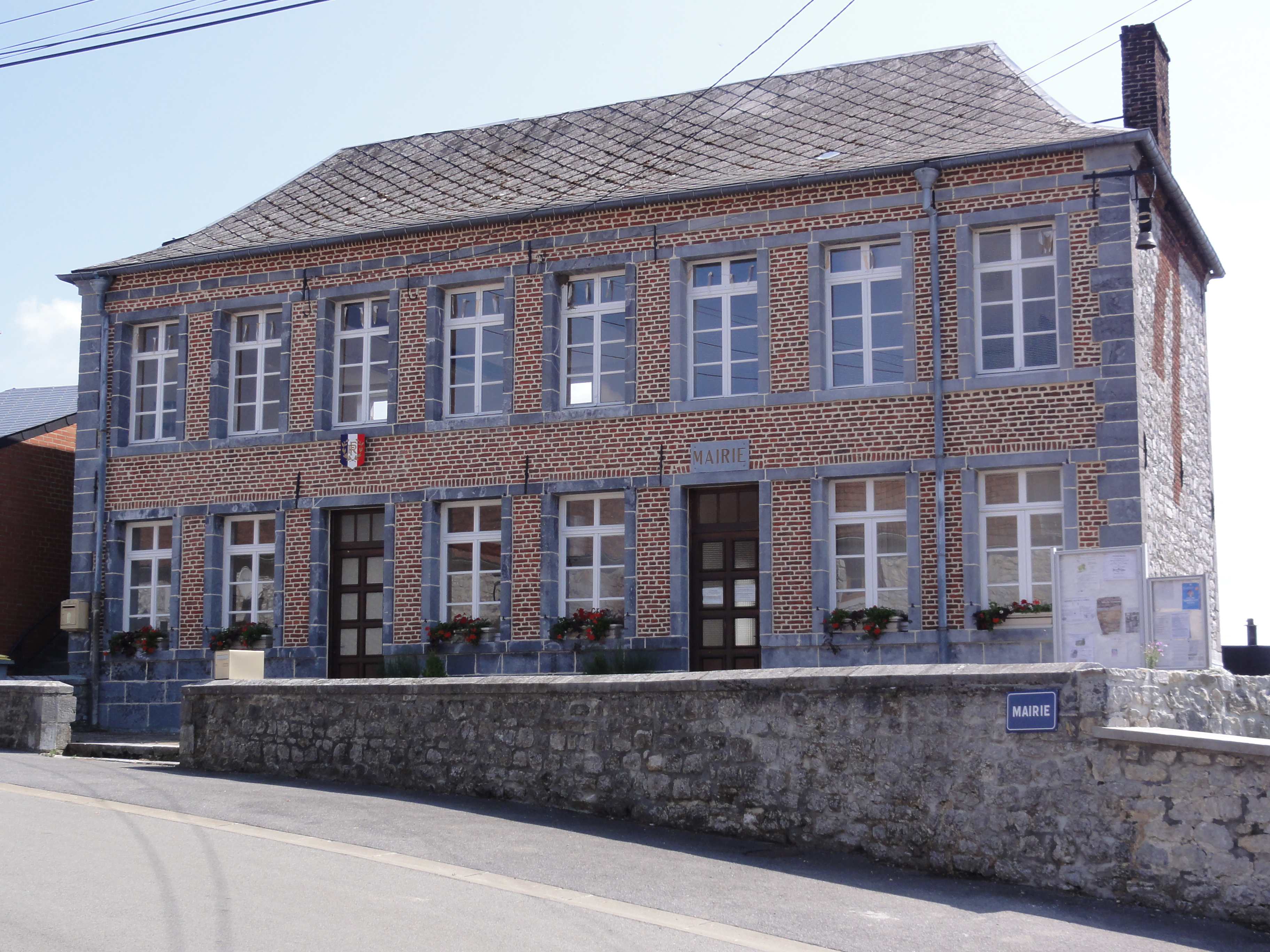 Bousignies-sur-Roc (Nord, Fr) mairie